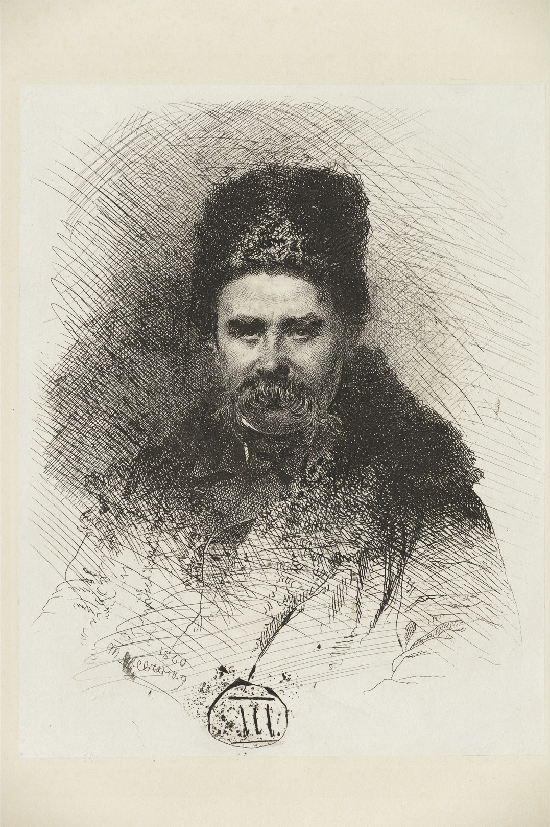 Автопортрет. Офорт. Санкт-Петербург 1860. Ліворуч унизу офортним штрихом авторські підпис і дата: 1860 Т. Шевченко. Нижче під портретом вигравірувана монограма: Ш.